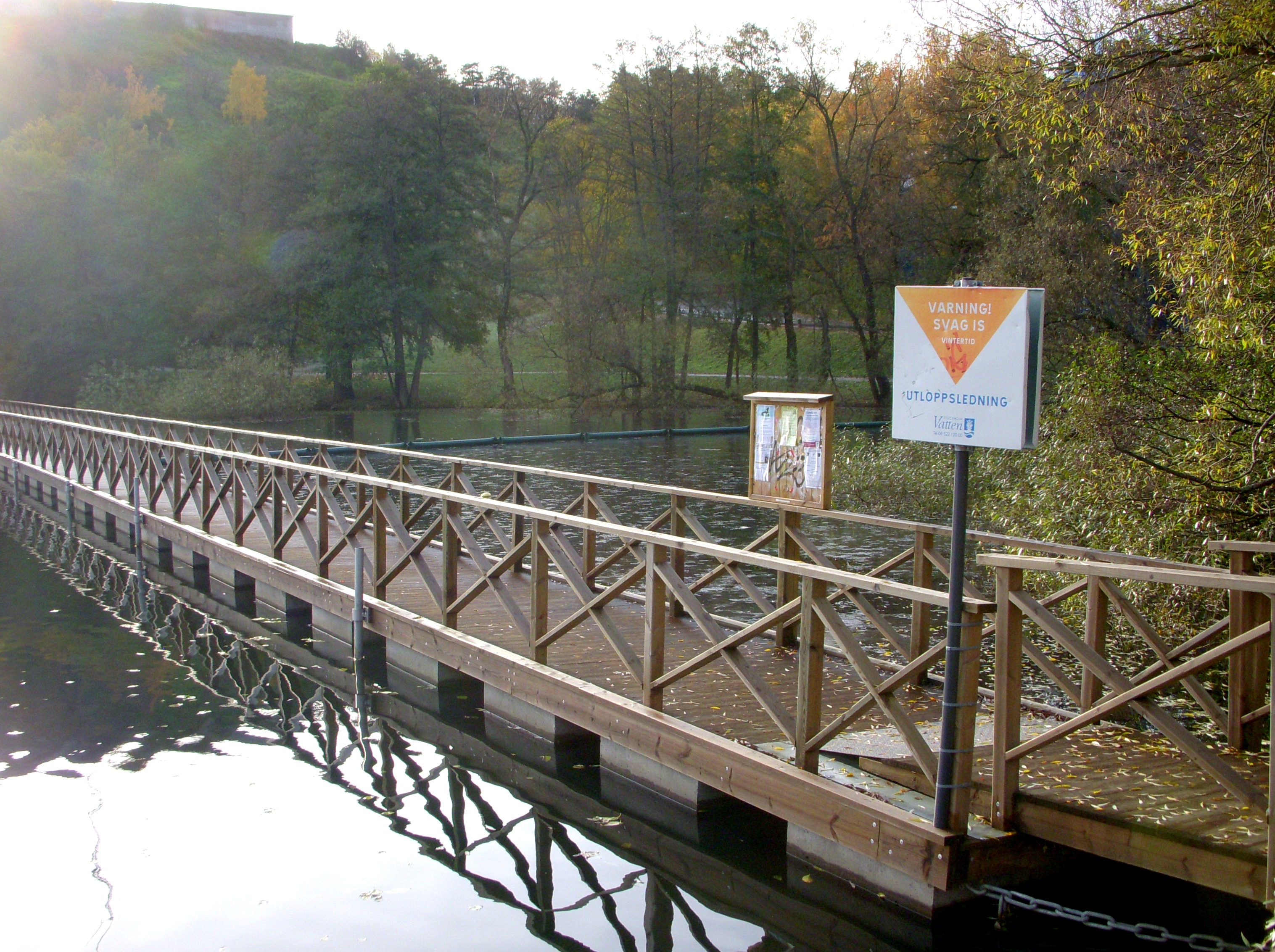 Uppsamlingsbassäng vid sjön Trekanten i Gröndal, i bakgrunden på höjden syns Nybohovsreservoaren